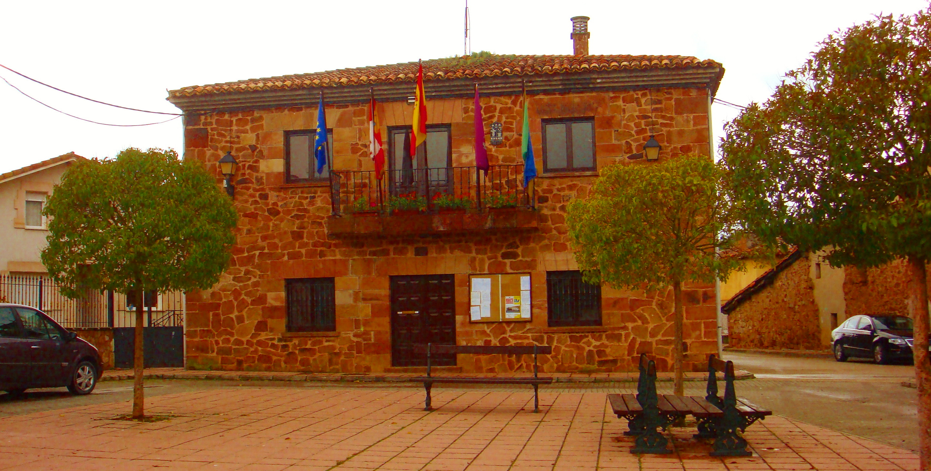 Ayuntamiento de Villasur de Herreros, Burgos (España).